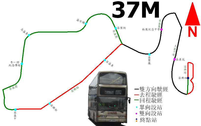 中文（香港）: 九巴37M線的走線圖